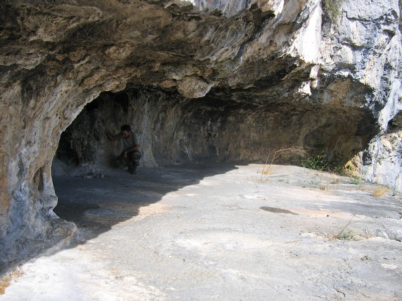 Abri sous roche, Plateau du Thaurac (Hérault, France)